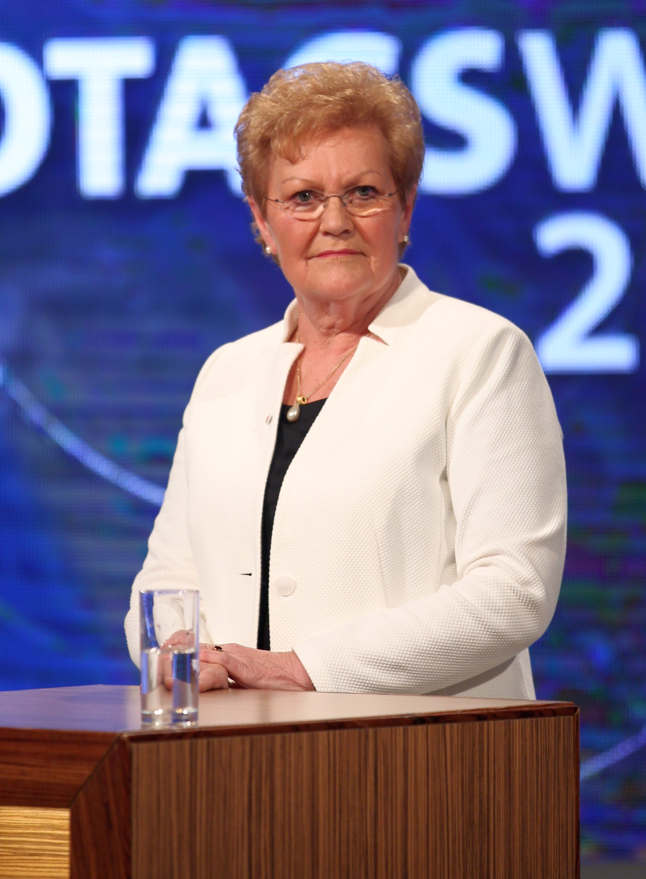 Monika Bachmann (CDU) beim Wahlabend zur Landtagswahl im Saarland